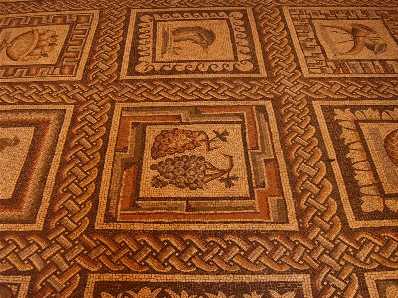 Vatican Pius Clementine Museum